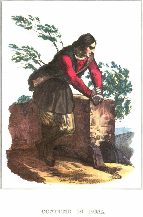 L'abito maschile di Bosa, litografia Portier, 1850